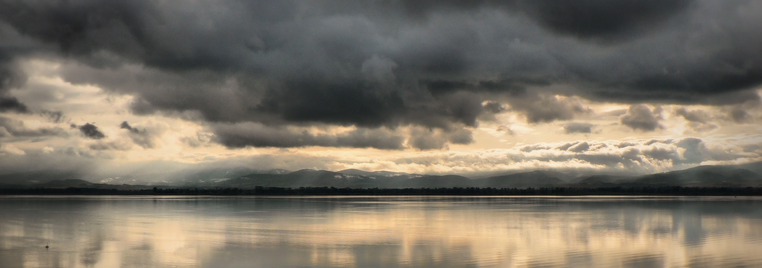 Widok na Południowe Sudety z Jeziora Otmuchowskiego.